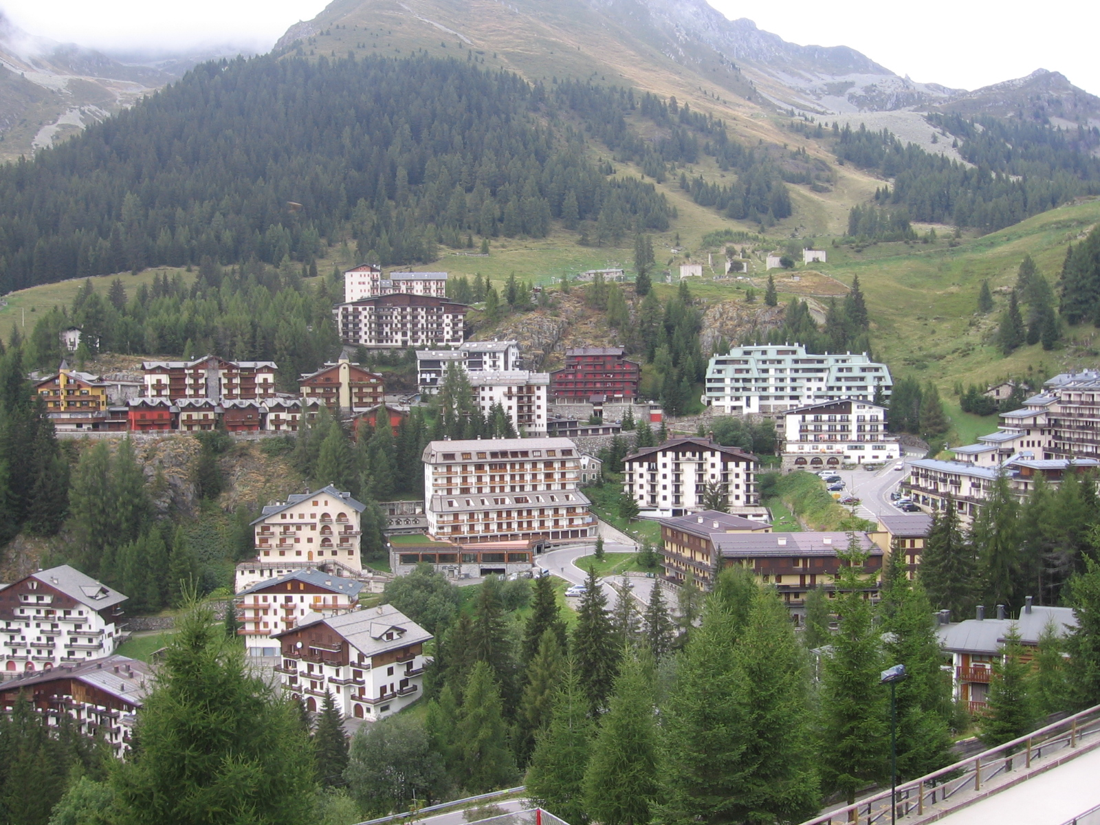 Foppolo, Bergamo, Italy